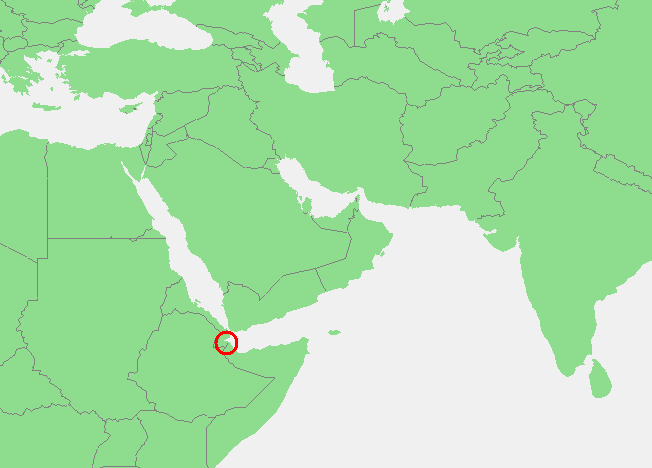 Tadjoura Bay